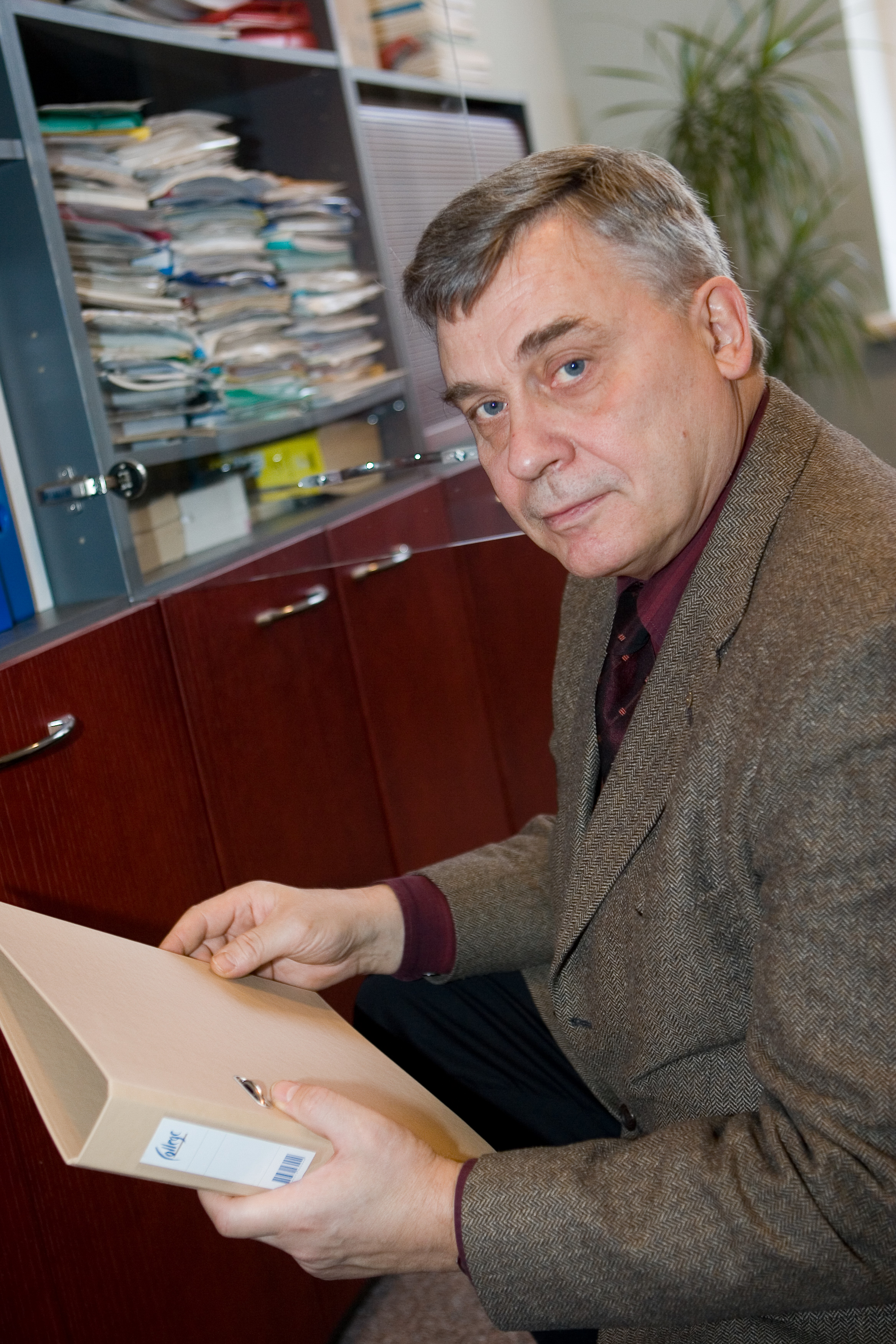 Tartu Ülikooli keemilise füüsika instituudi molekulaartehnoloogia õppetooli juhataja professor Mati Karelson. Pilt 2006. aasta TÜ aastaraamatusse.